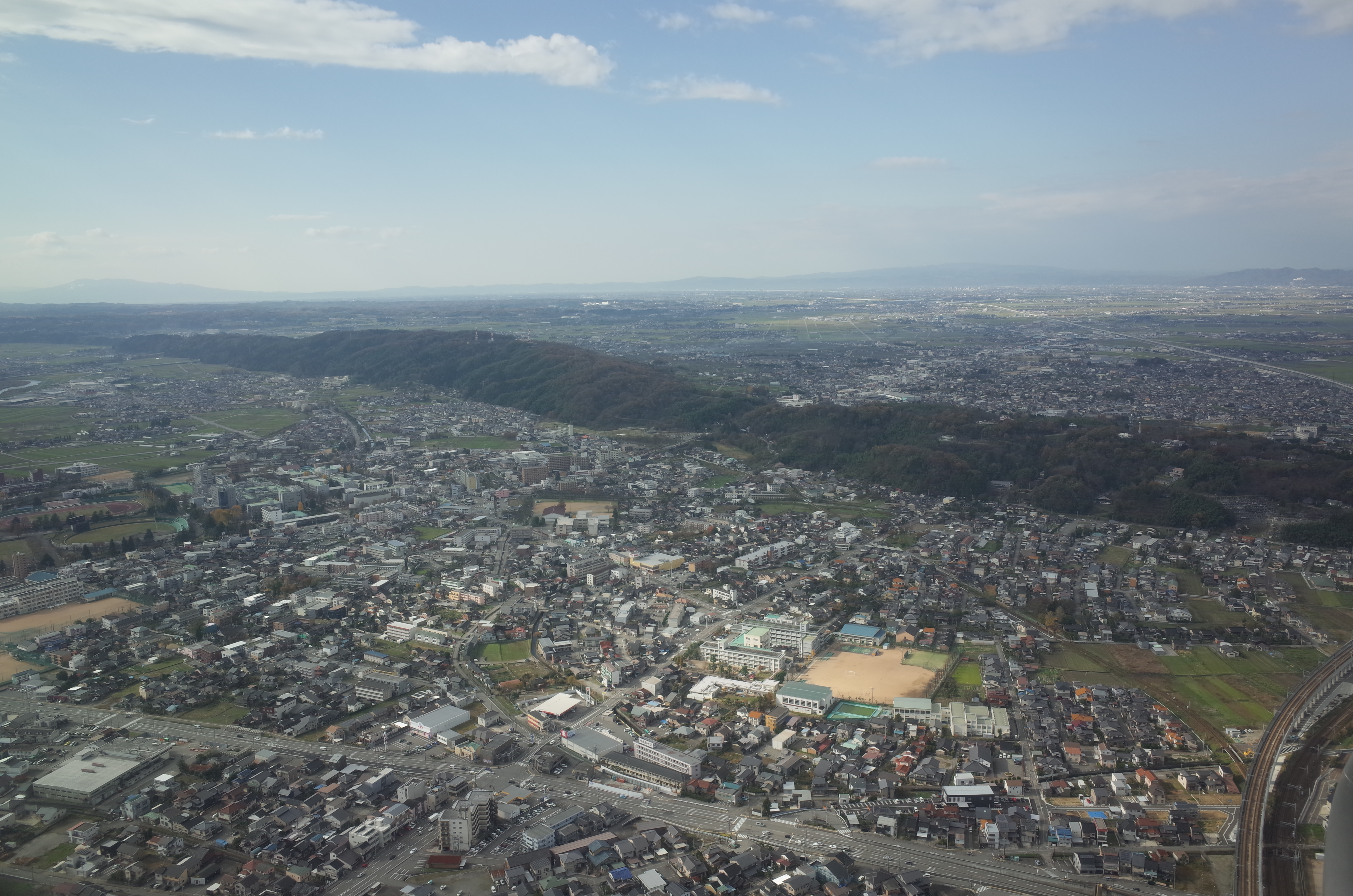 富山航空写真。画像中央の学校は富山大学の付属学校群である